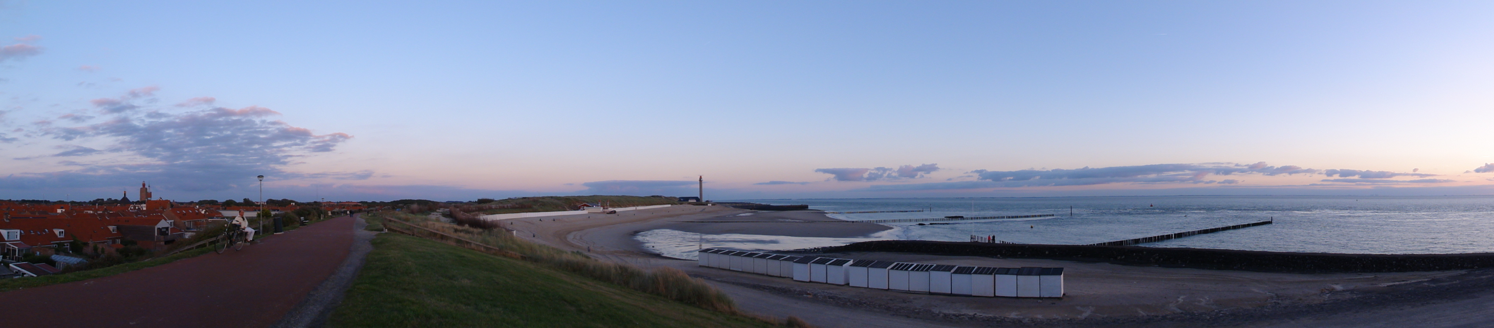 Westkapelle, Dijk en badstrand ('t gat)